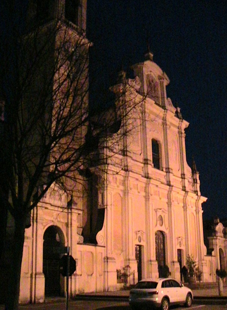 Rivarolo del Re - Chiesa Parrocchiale di San Zeno